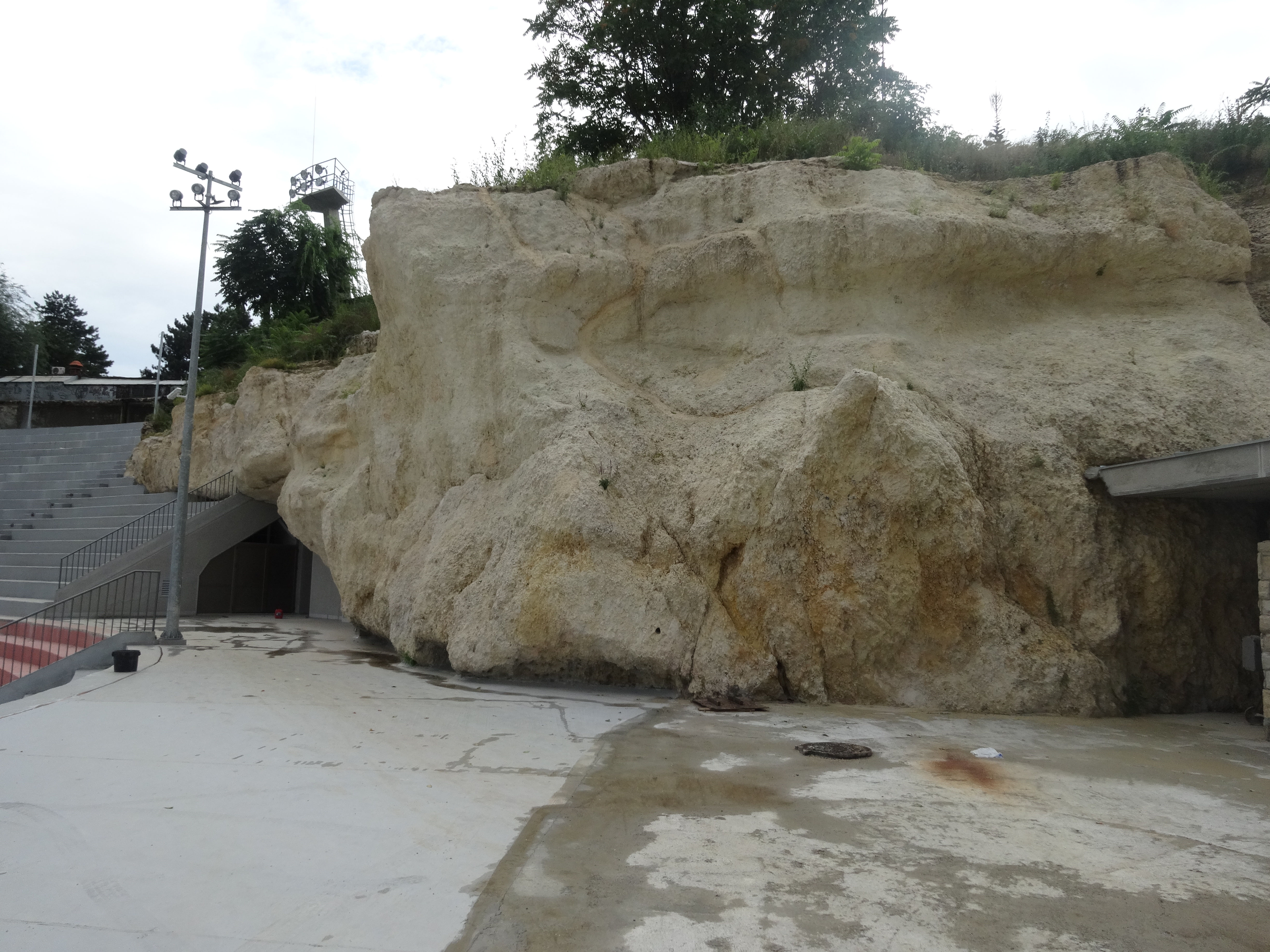 Природни споменик Миоценски спруд Ташмајдан Ово је фотографија заштићеног природног добра у Србији под шифром: СП020 This is a a photo of a natural area in Serbia with ID: СП020